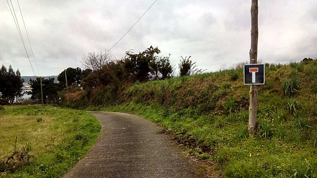 Vista das defensas do castro das Escadas, Mugardos.